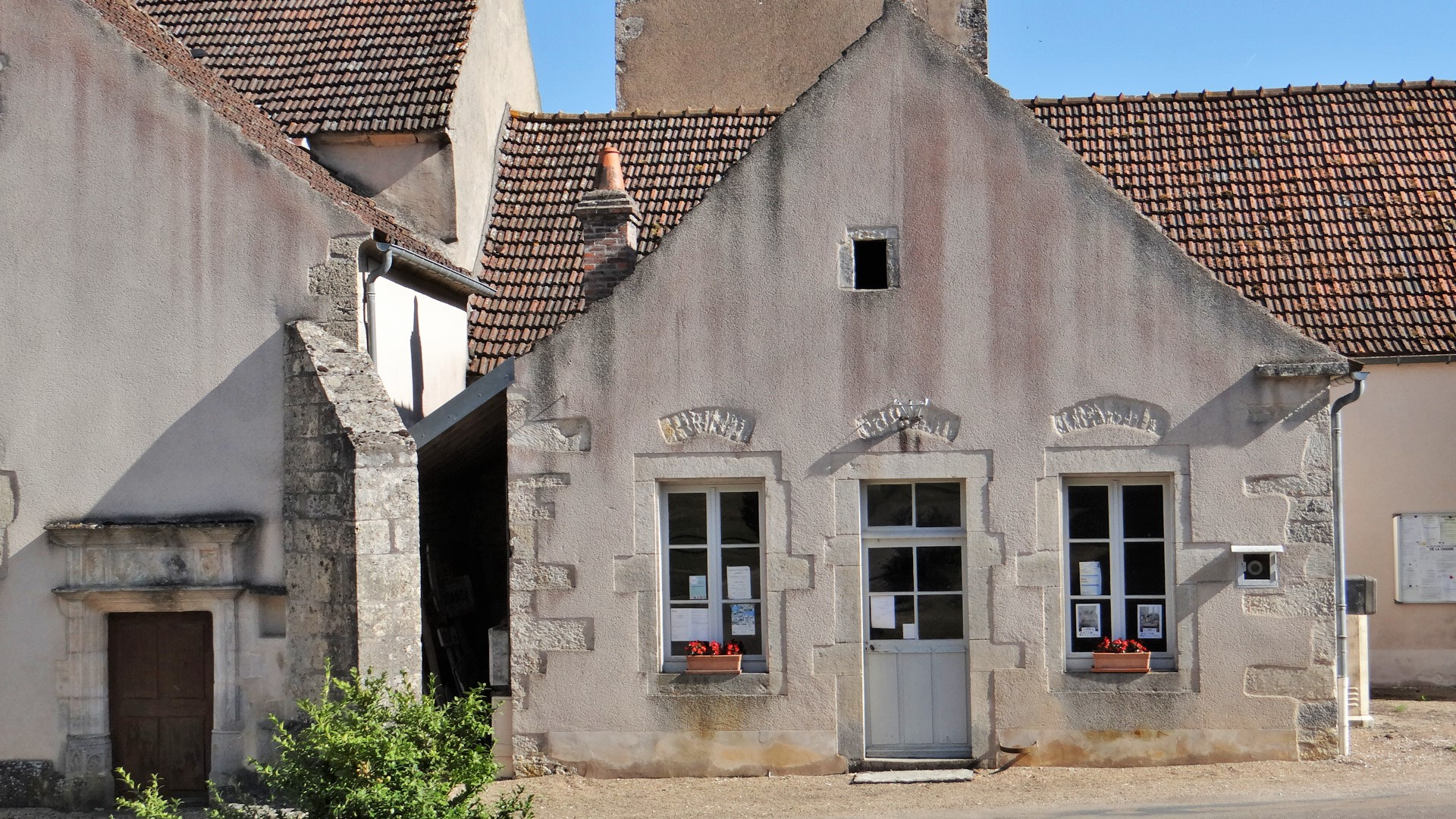 La mairie est accolée à l'église.